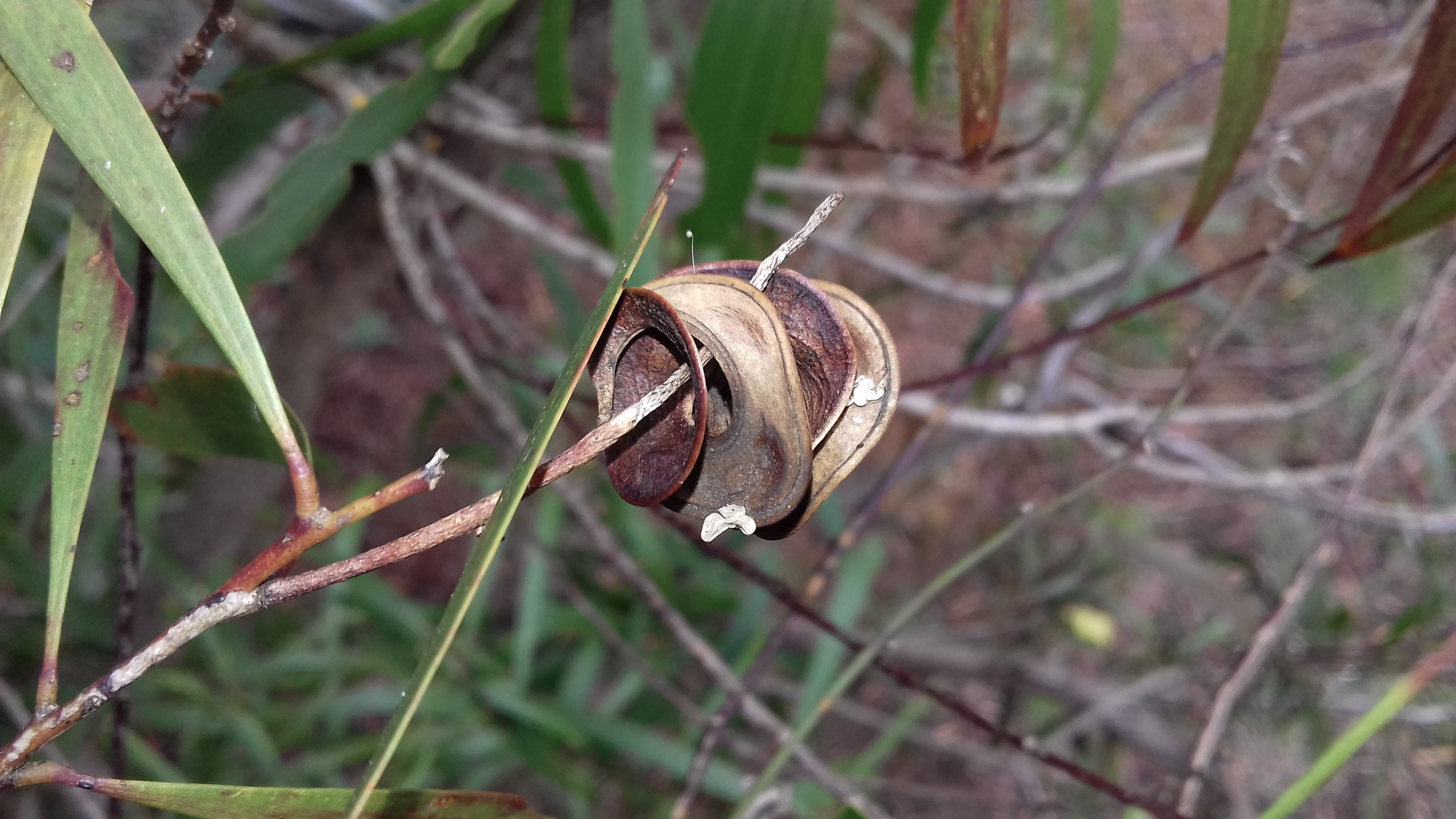 Gousse d'Acacia spirorbis, Nouméa, Nouvelle-Calédonie